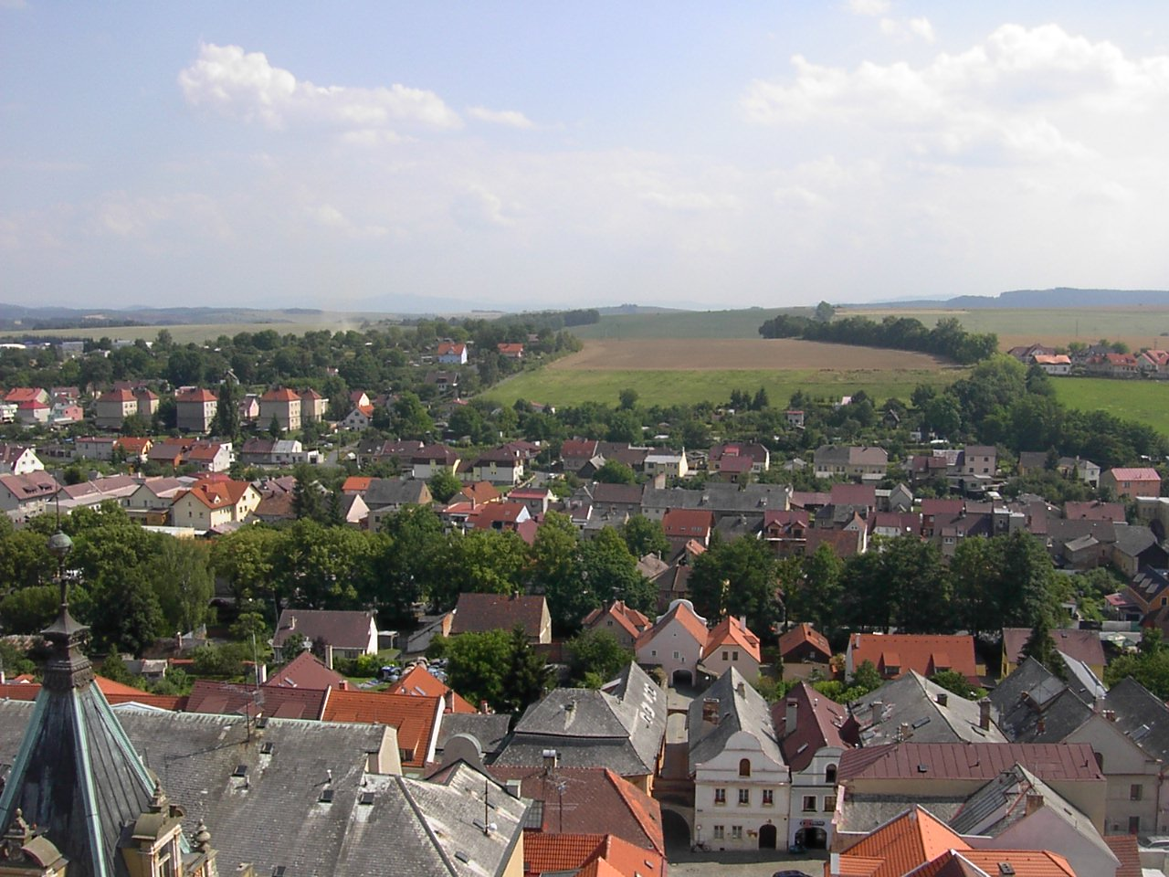 Střední část Bezděkovského předměstí v Domažlicích.